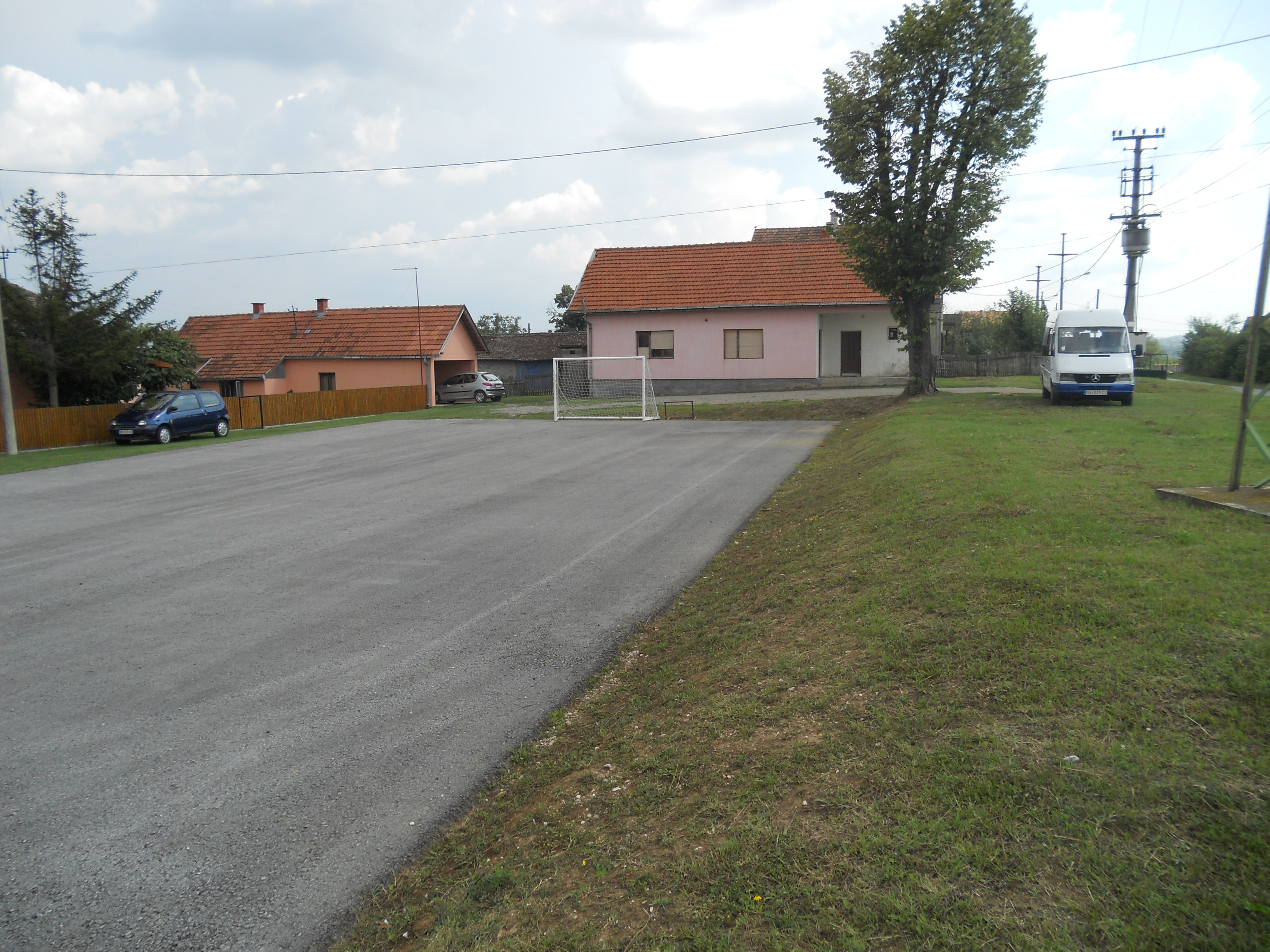 Bobovik, zgrada mesne zajednice